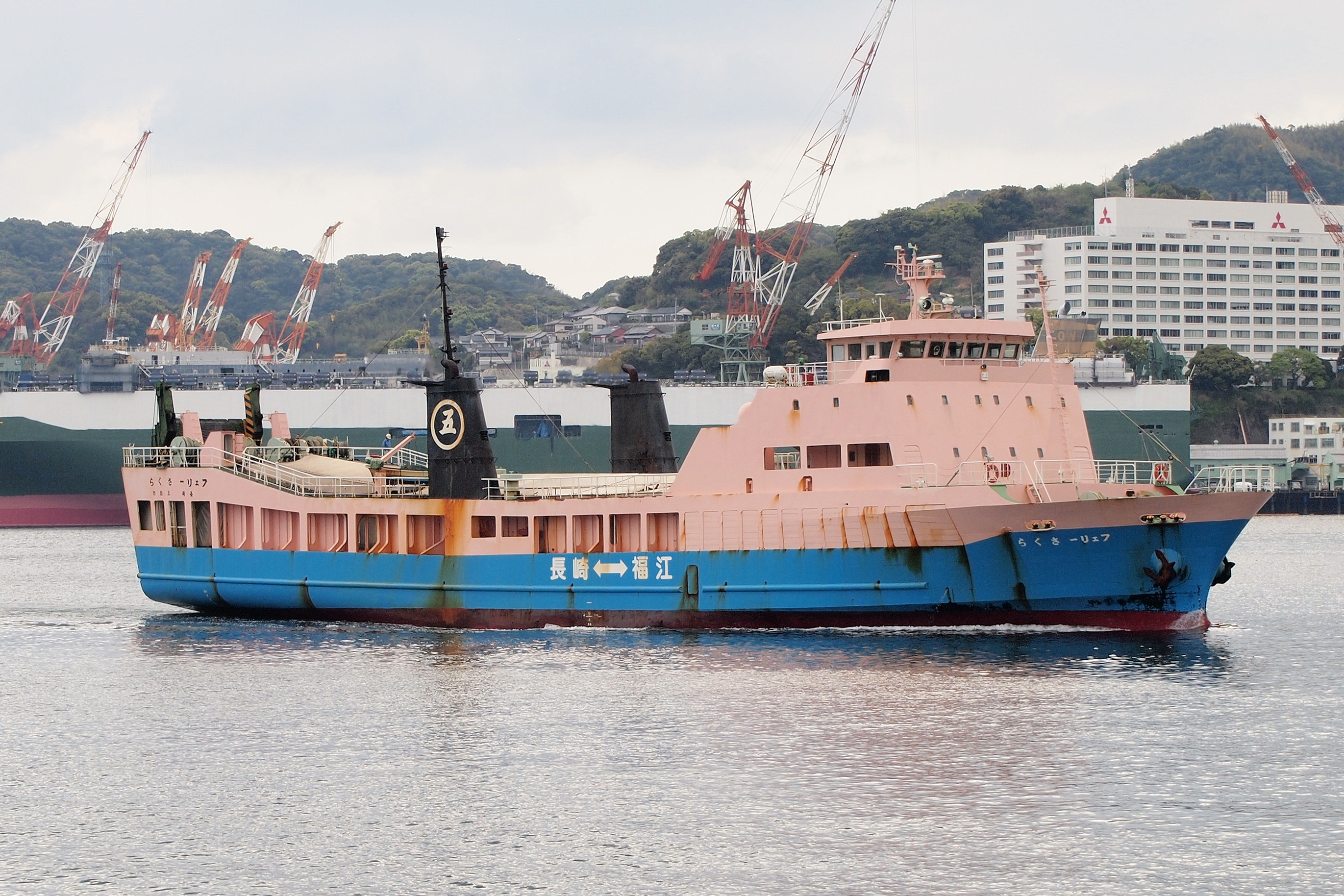 五島汽船の貨物フェリー「フェリーさくら」。長崎港にて。